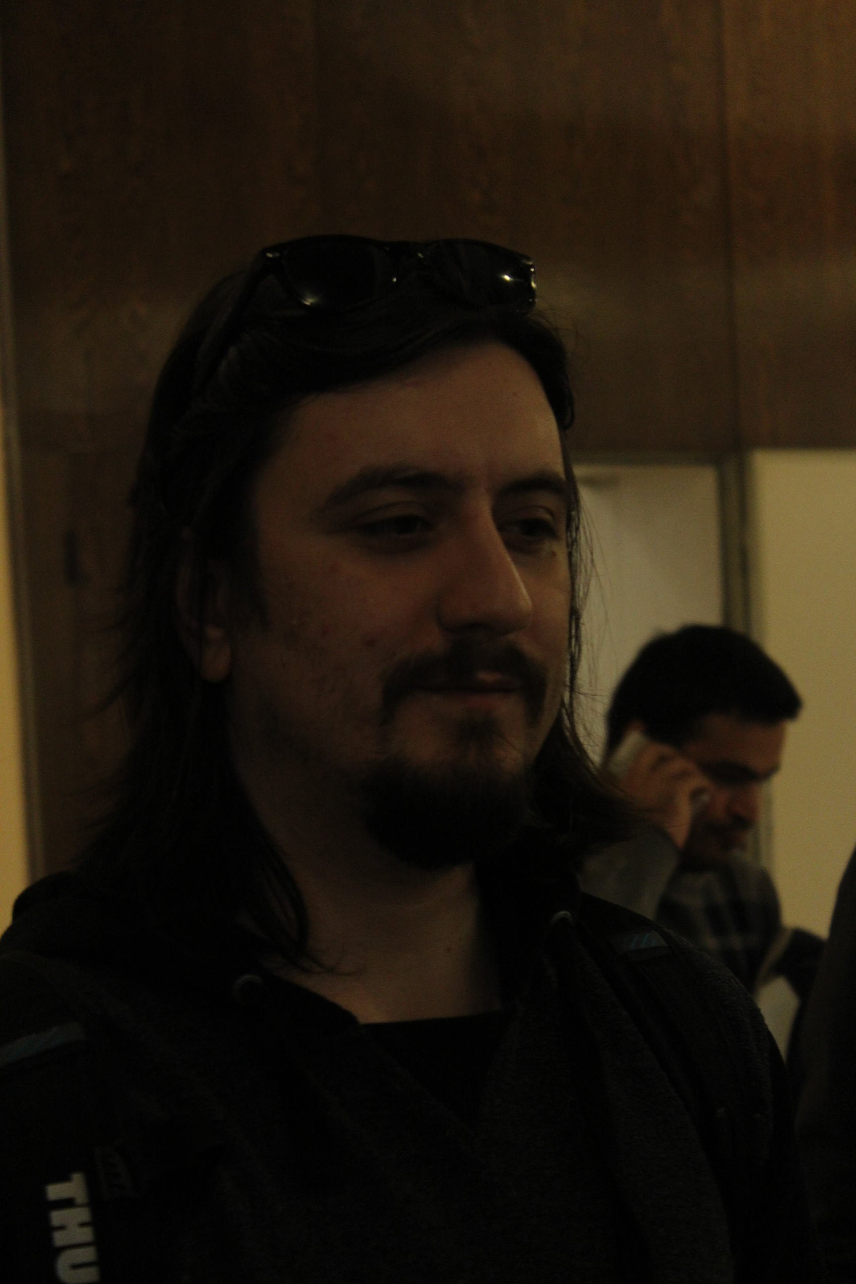 İnci Sözlük kurucusu Serkan İnci, Bilkent Üniversitesi'ndeki konferansı sonrasında.